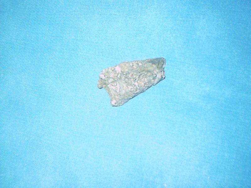 Pezzo di roccia "Pelle di Leopardo" grezza